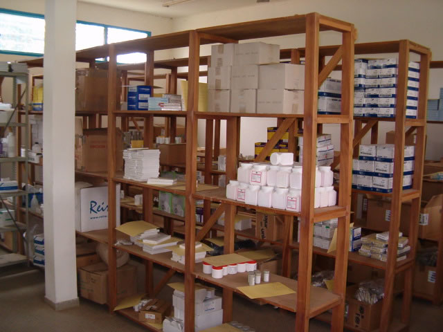 Vue des médicaments du district sanitaire de Dabakala (Côte d'Ivoire).